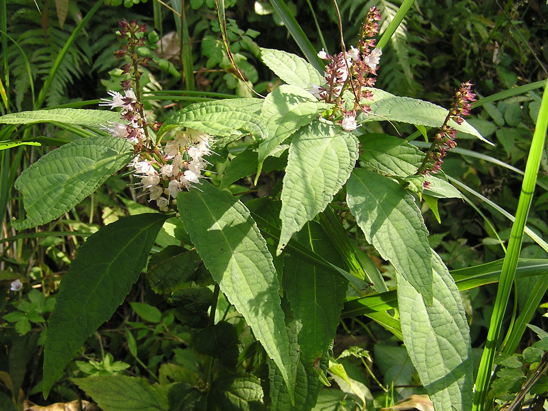 シモバシラ （10月）